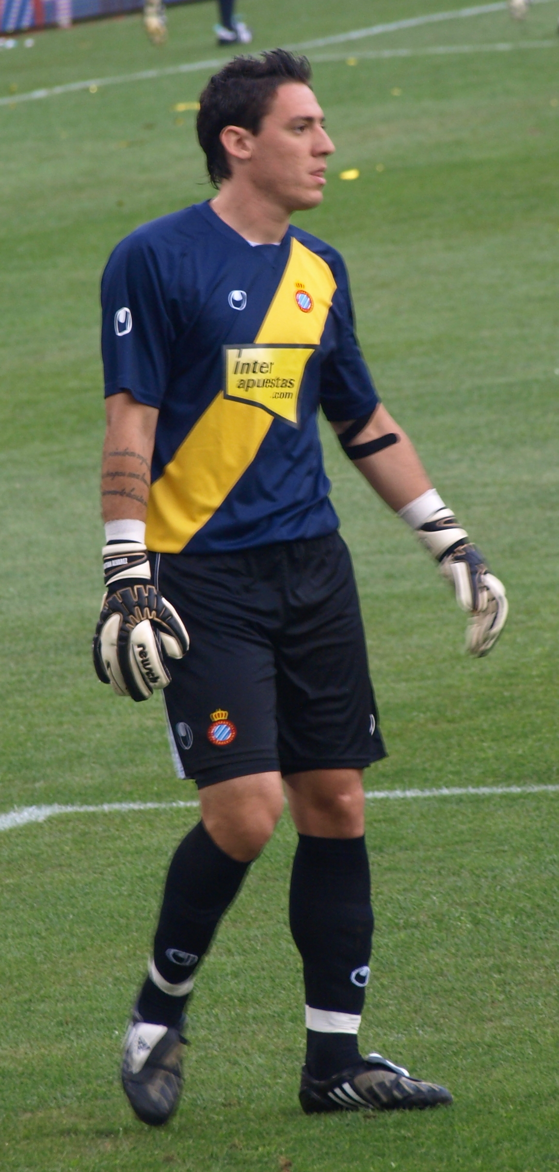 Cristian Álvarez, defendiendo los colores del RCD Español instantes antes de comenzar el partido ante el Liverpool FC de inauguración del Estadio de Cornella-El Prat.